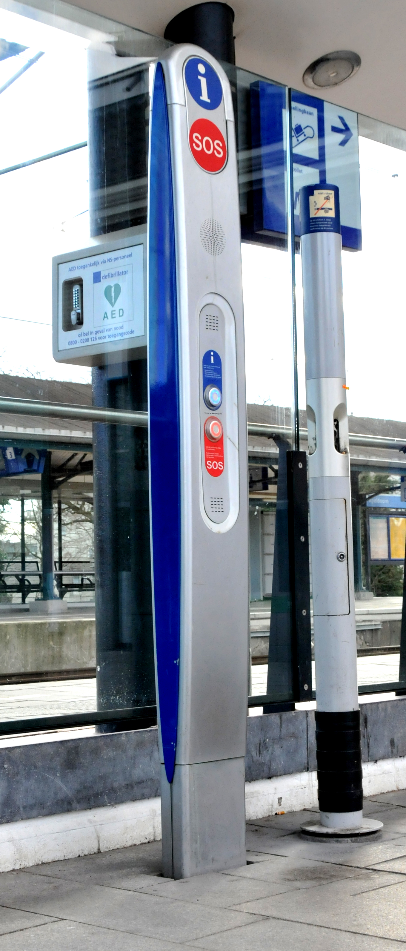 praatpaal.